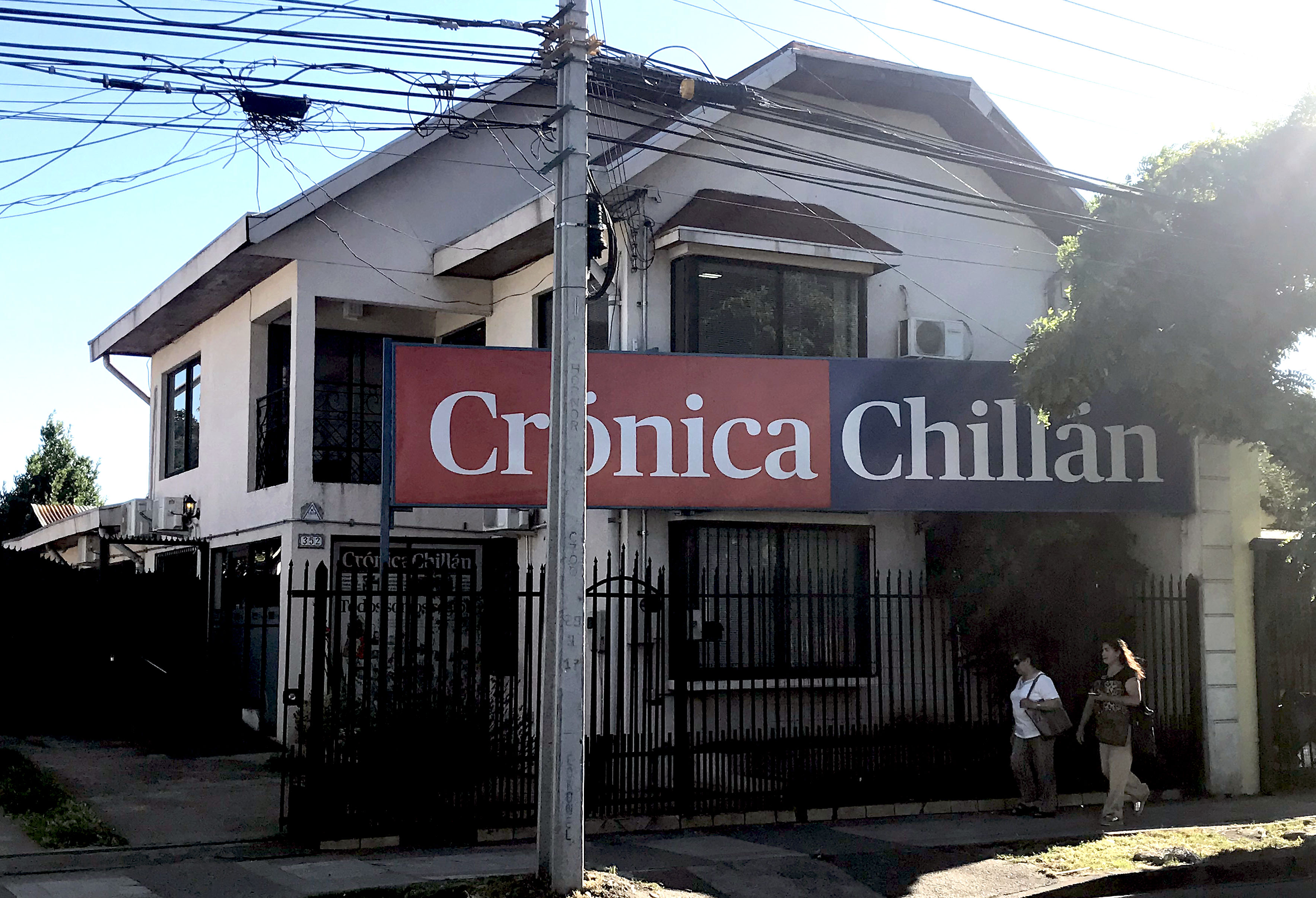 Diario Crónica de Chillan. Chile.